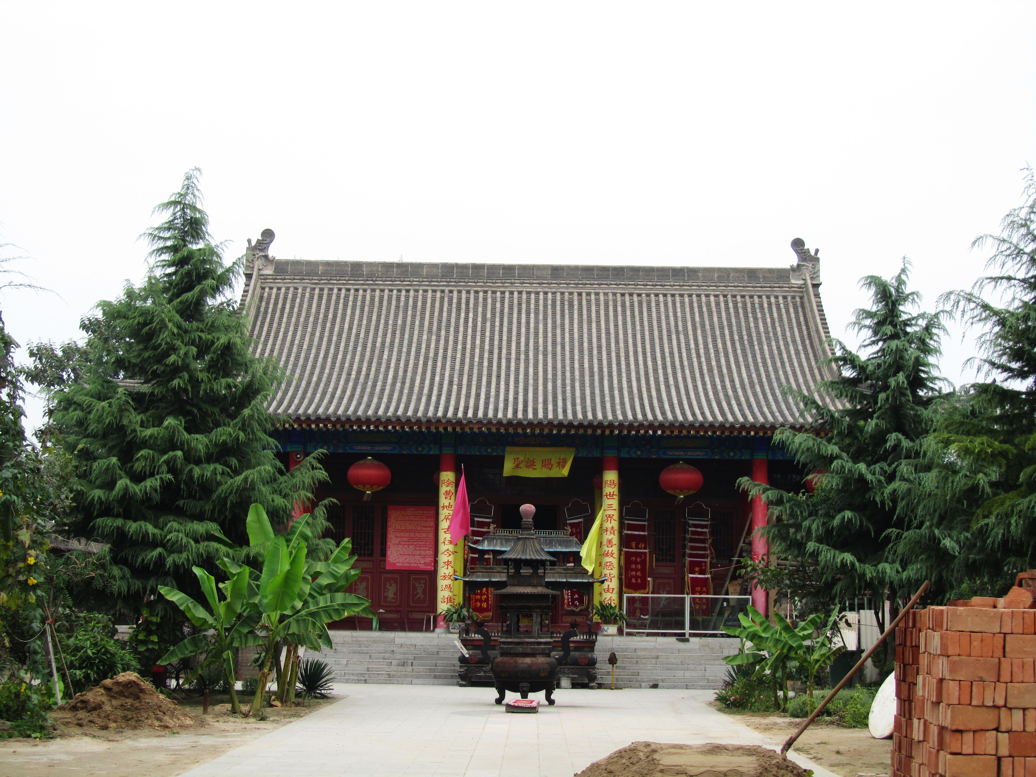 渭南城隍庙，正殿城隍殿。